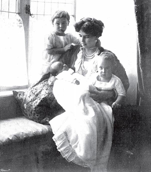 Retrato de la princesa Beatriz de Sajonia-Coburgo-Gotha y sus tres hijos publicado en 1913